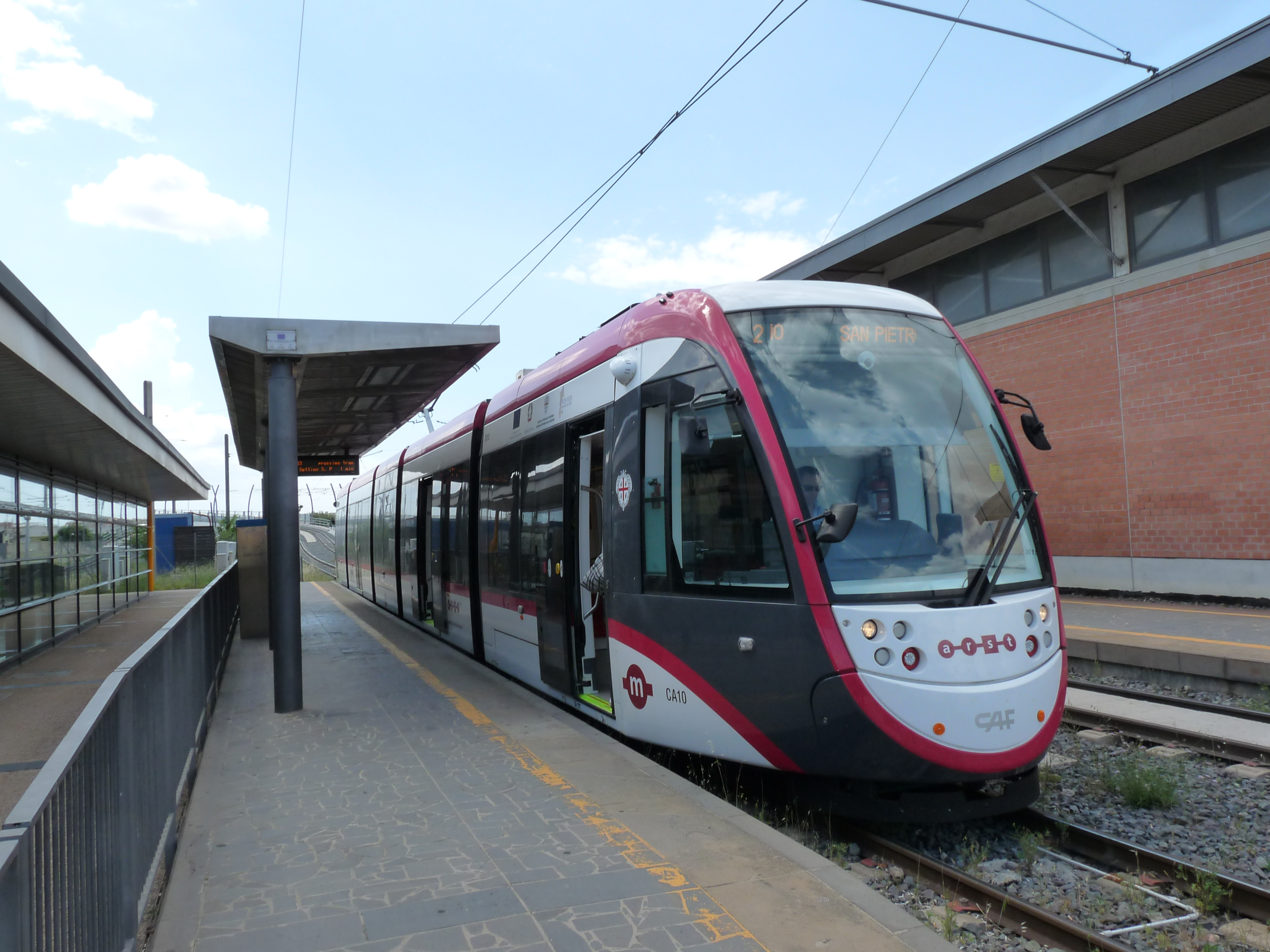 De tram lijn 2, Gottardo knooppunt.